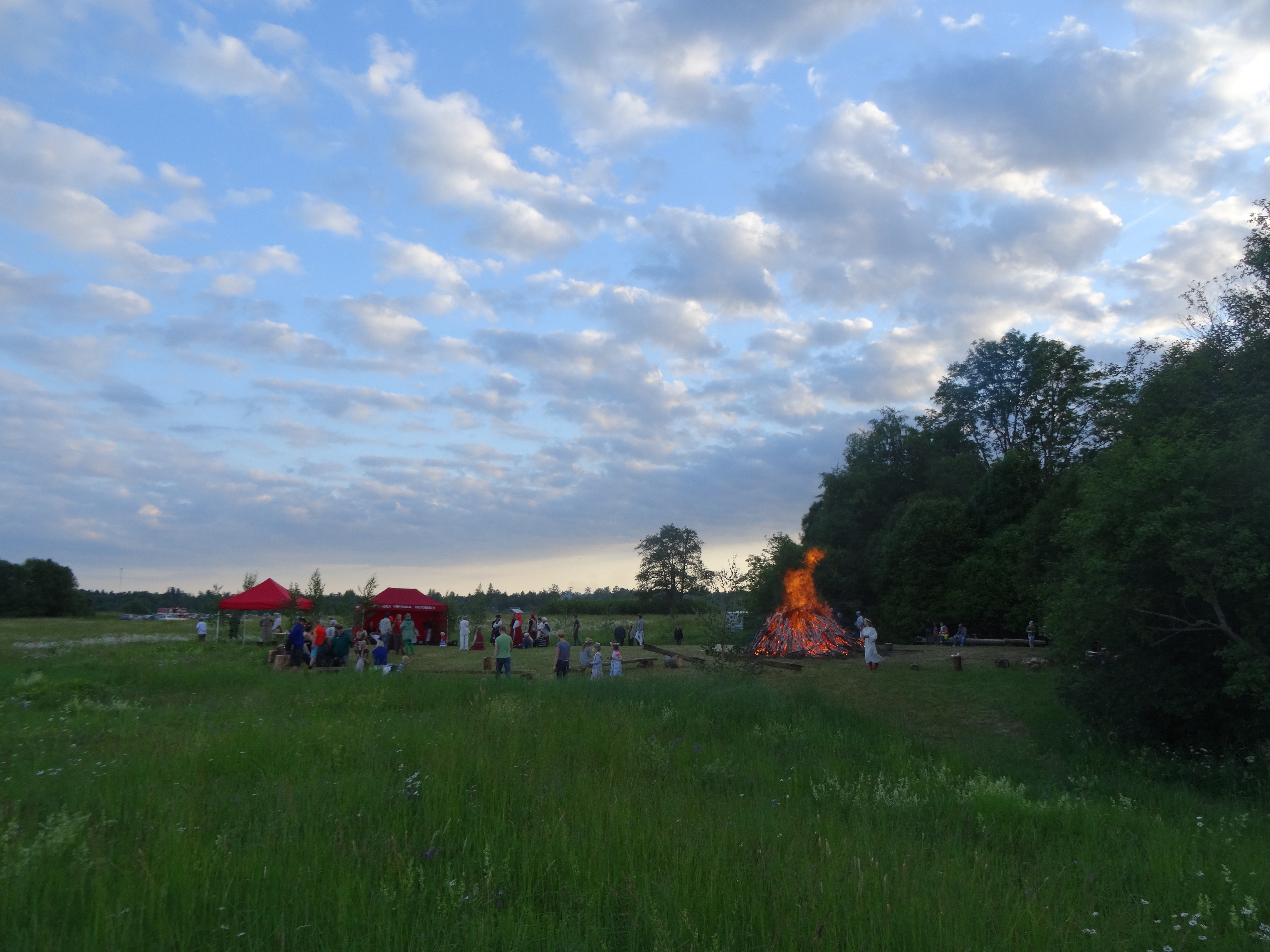 Pärimuslik jaanipidu Vana-Vigala ohvrihiie juures (juuni 2016)